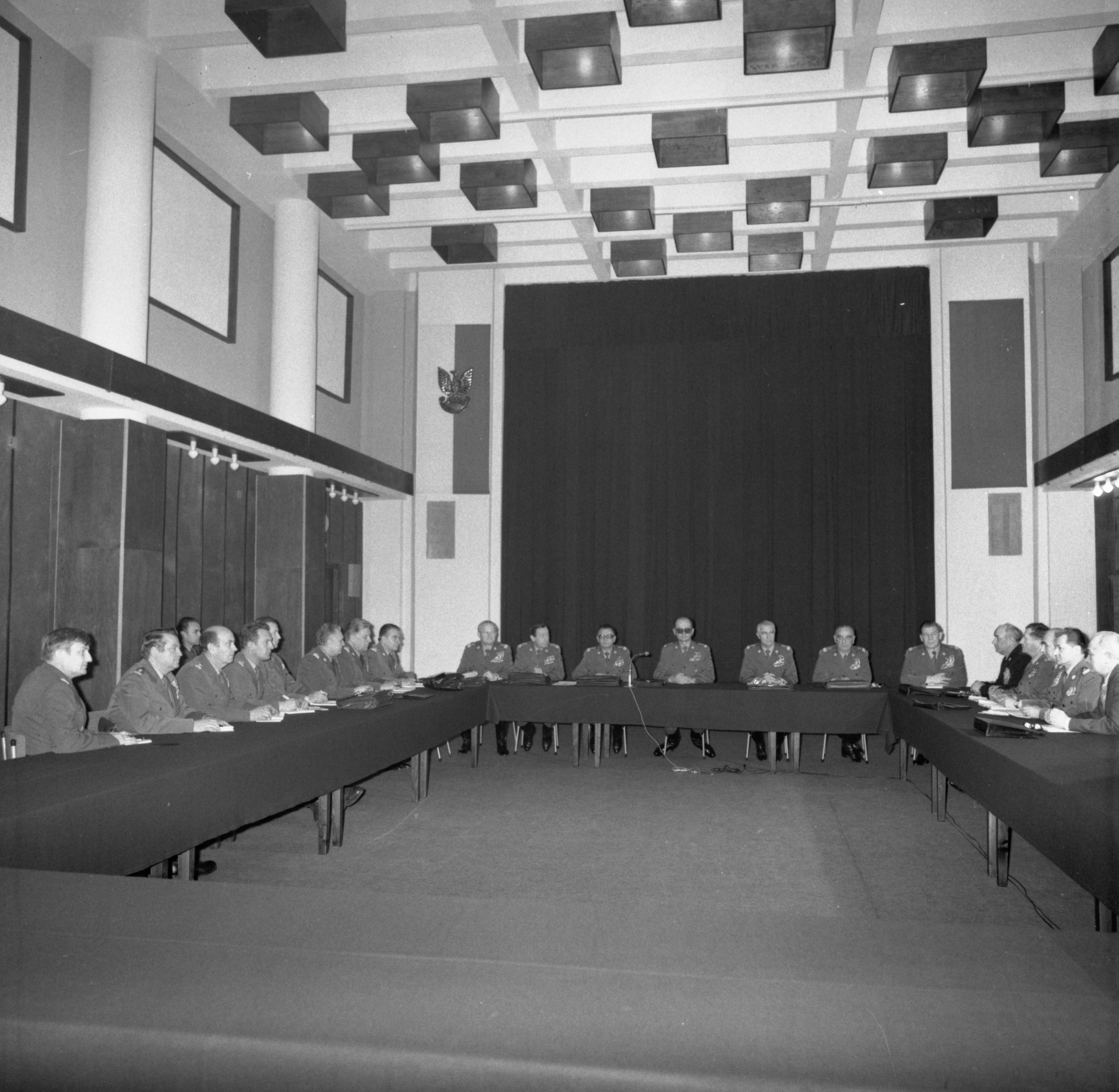 Posiedzenie Wojskowej Rady Ocalenia Narodowego pod przewodnictwem gen. Wojciecha Jaruzelskiego. Warszawa, 14 XII 1981